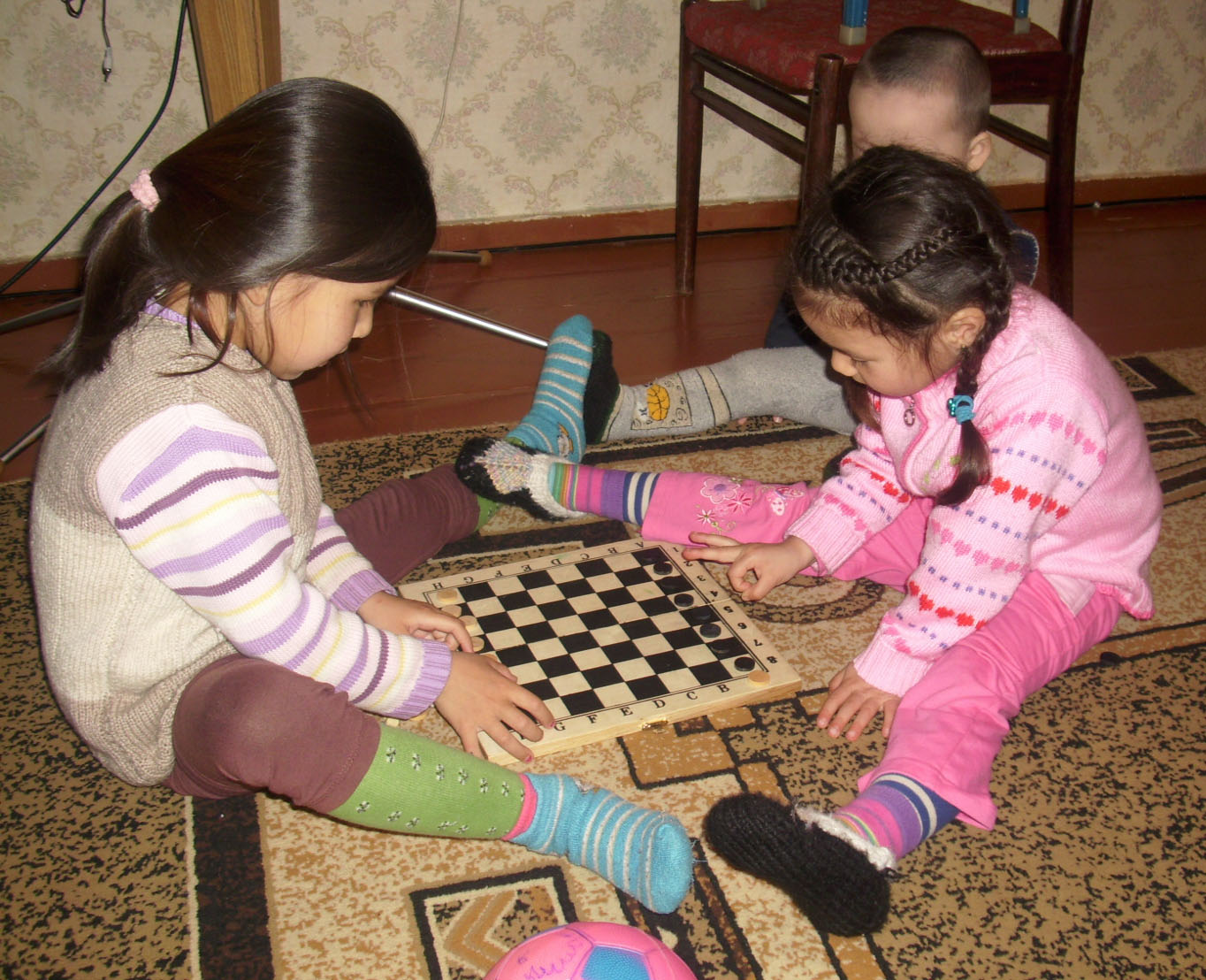 Дети играют в Чапаева